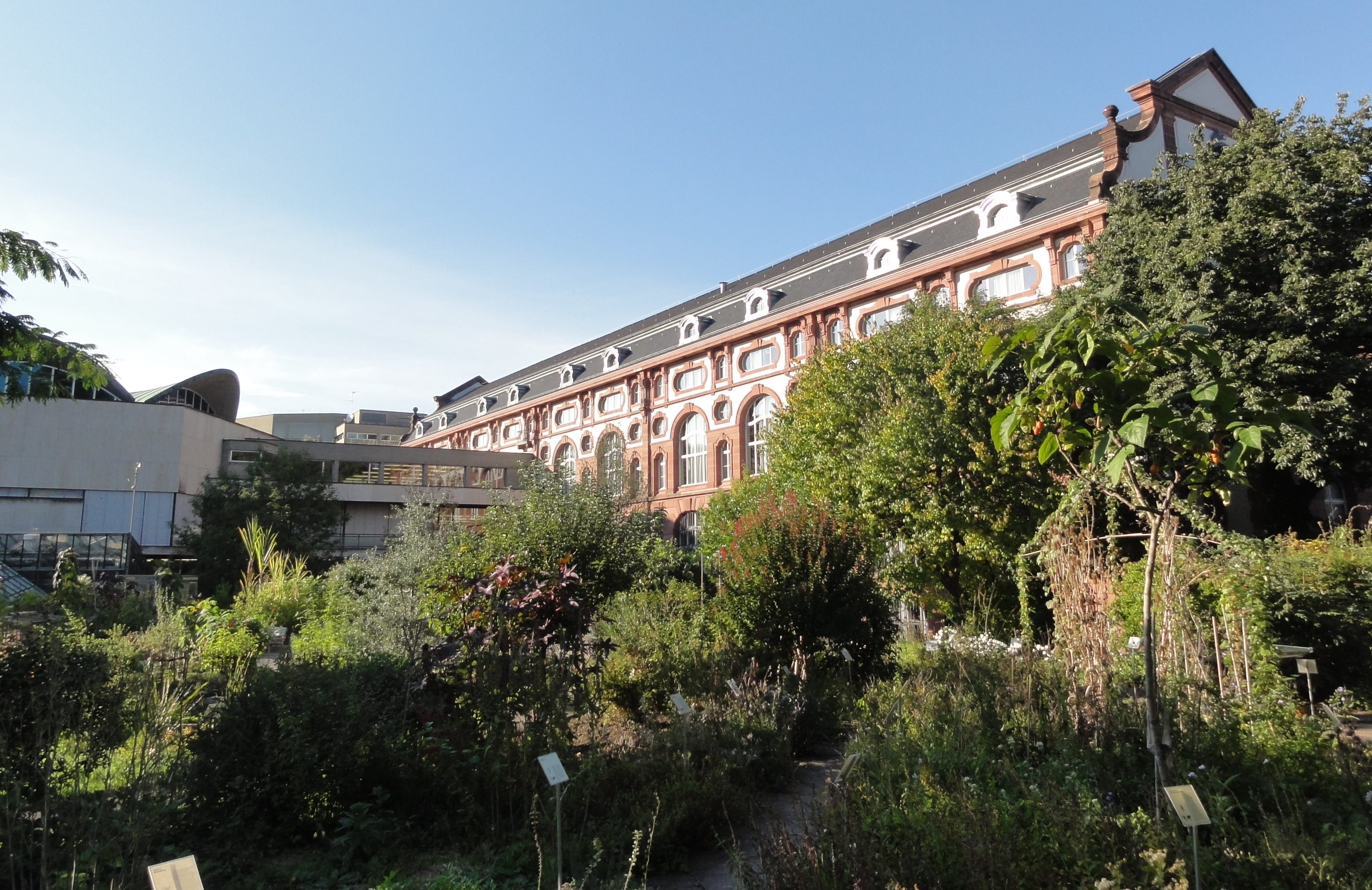 Basel — Botanischer Garten der Universität